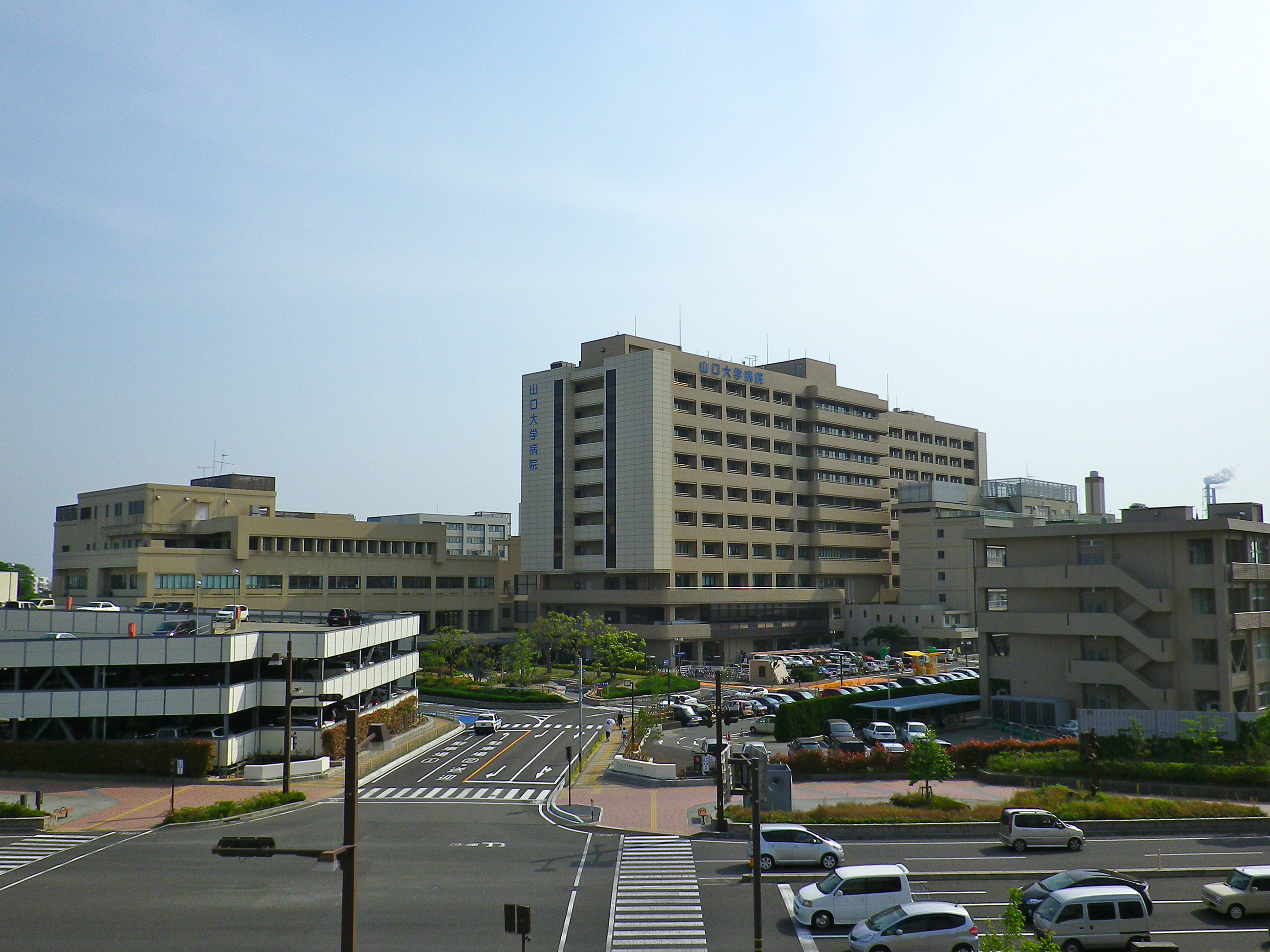 山口県宇部市。山口大学医学部附属病院。2011年5月19日撮影。